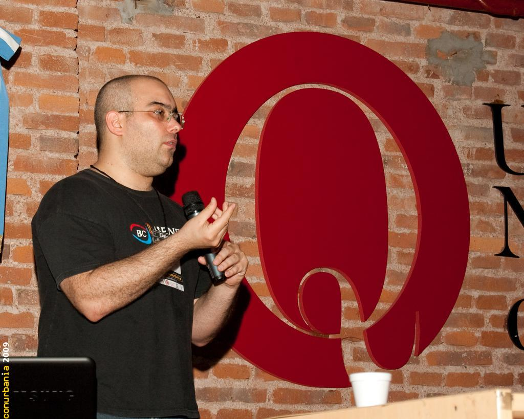 Ariel Vercelli